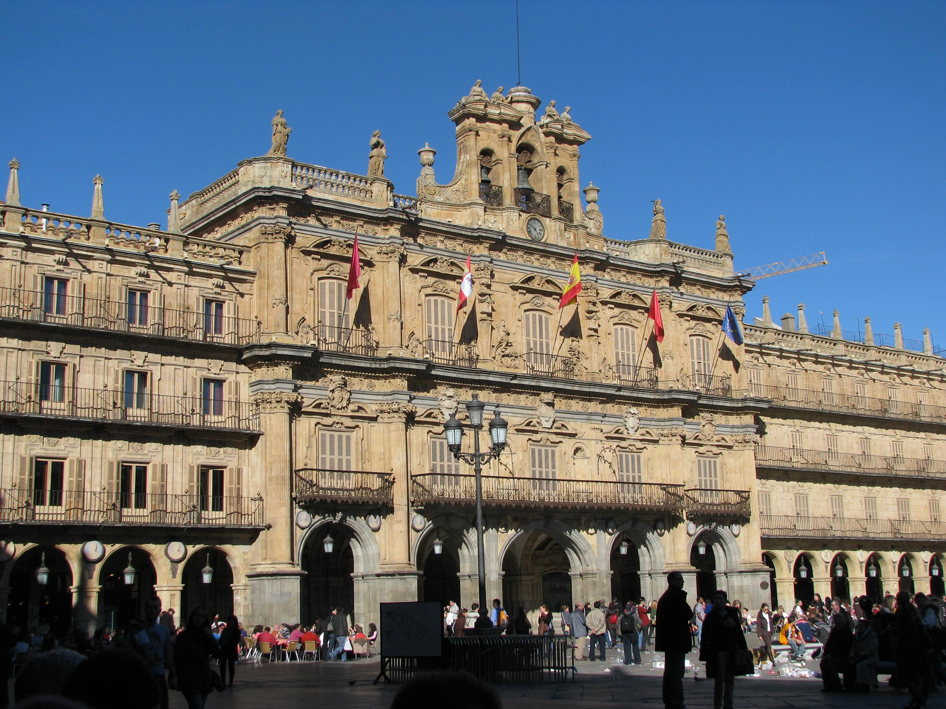 Fachada de la Plaza Mayor de Salamanca (España)